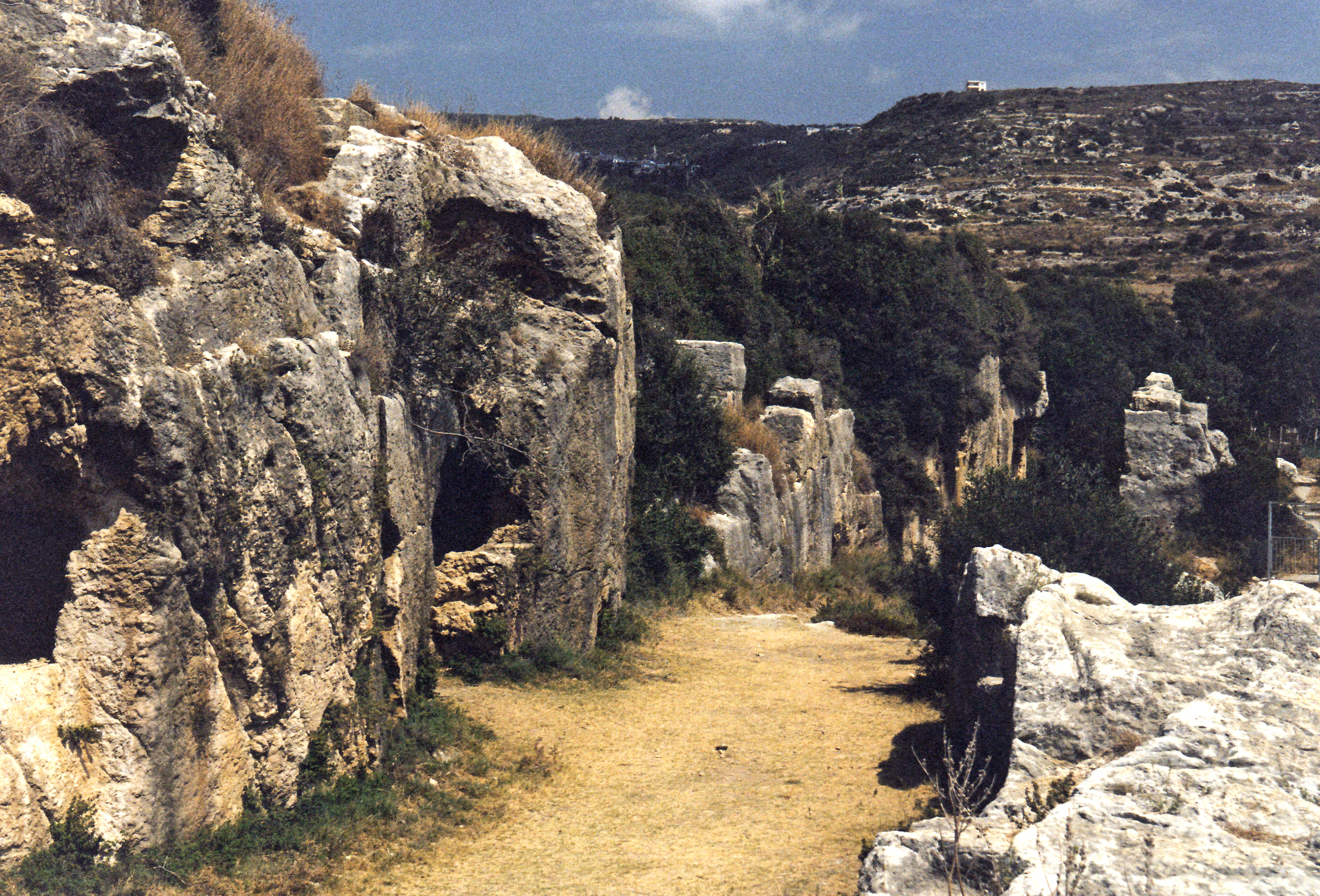 Vespasianus-Titus-Tunnel in Çevlik bei Samandağ, Südtürkei, Kanalteil